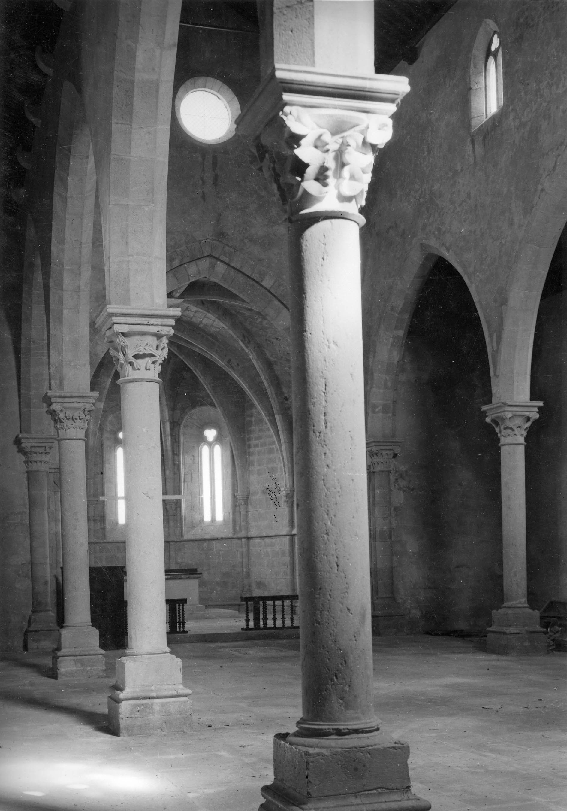 Vista interior. Fotógrafo: Mário Novais, 1899-1967. Orientador científico: Mário Tavares Chicó, 1905-1966. Data aproximada da produção da fotografia original: 1954. [CFT015.236.ic]